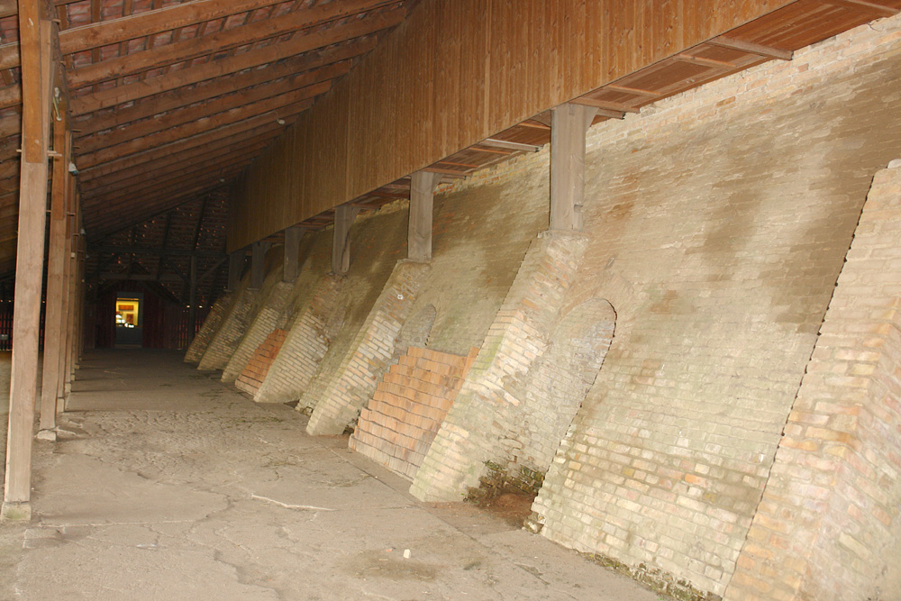 Cathrinesminde Teglvaerk an der Flensburger Förde. Als Ziegelei gegründet 1732, stillgelegt 1968. 1986 bis 1993 restauriert, heute Ziegeleimuseum. Ringofen